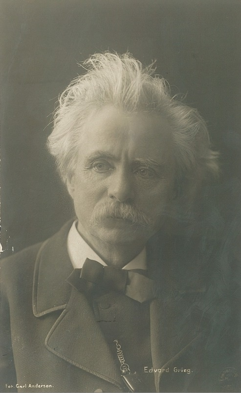 Edvard Grieg, portrett, mann, komponist, brystbilde.